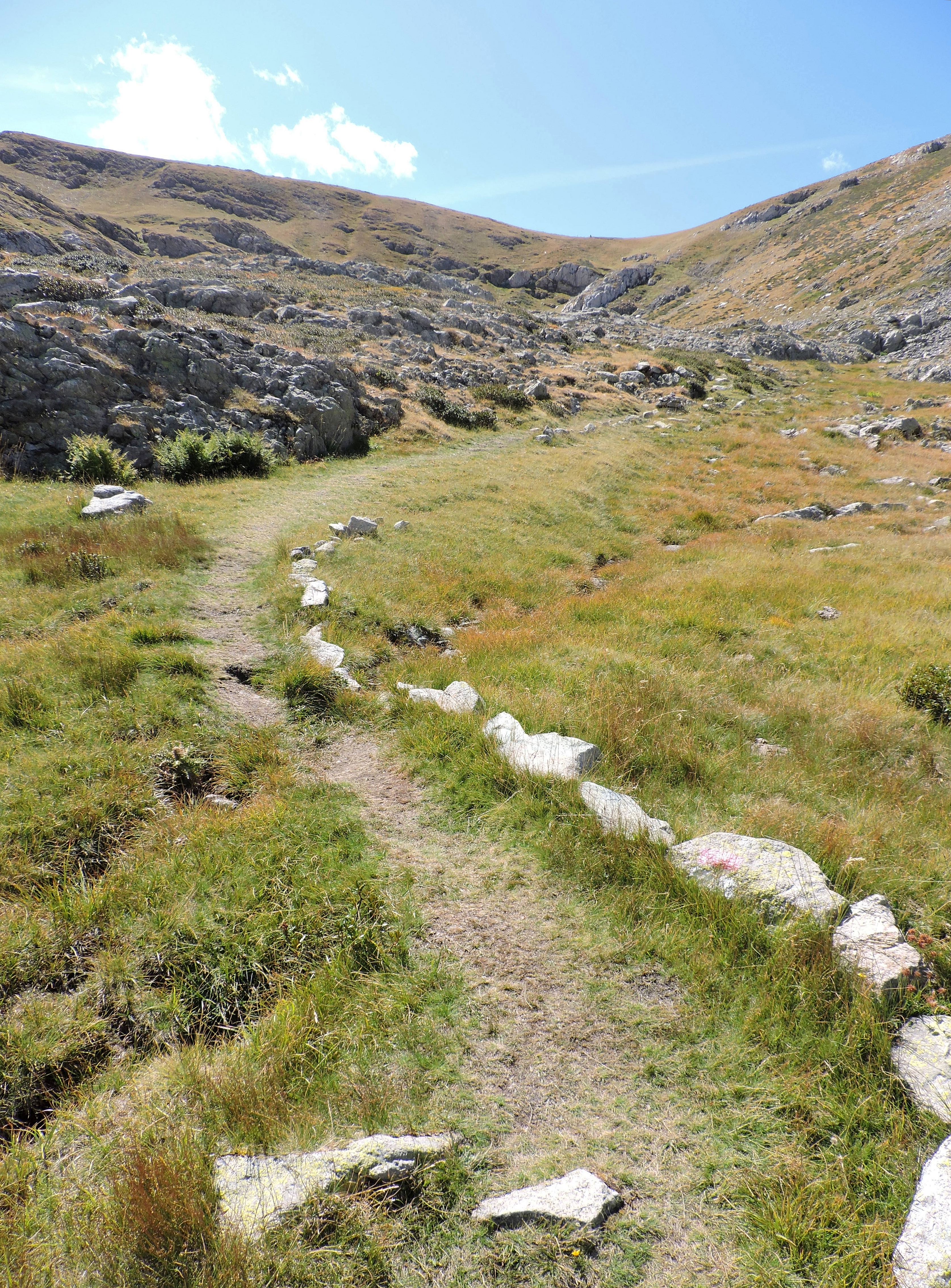 Il Colle del Pas (Alpi Liguri)